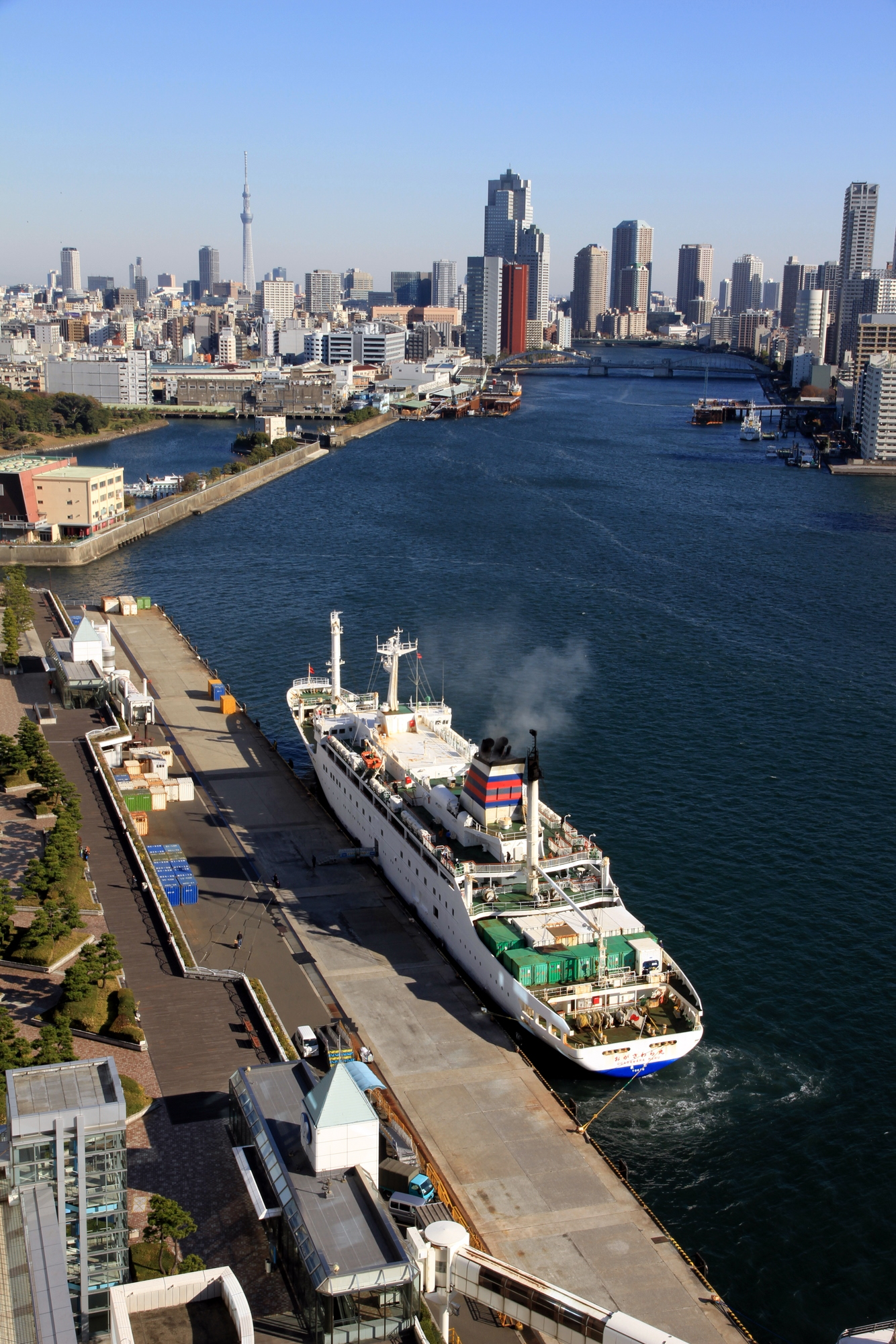 竹芝桟橋に接岸中のおがさわら丸と、東京スカイツリー